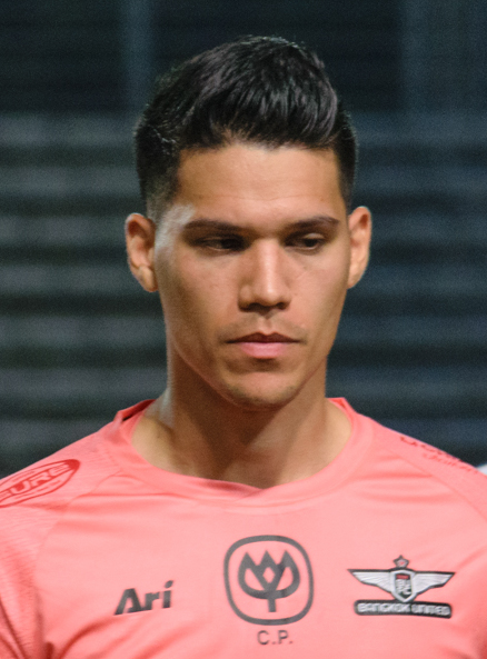 Michael Falkesgaard